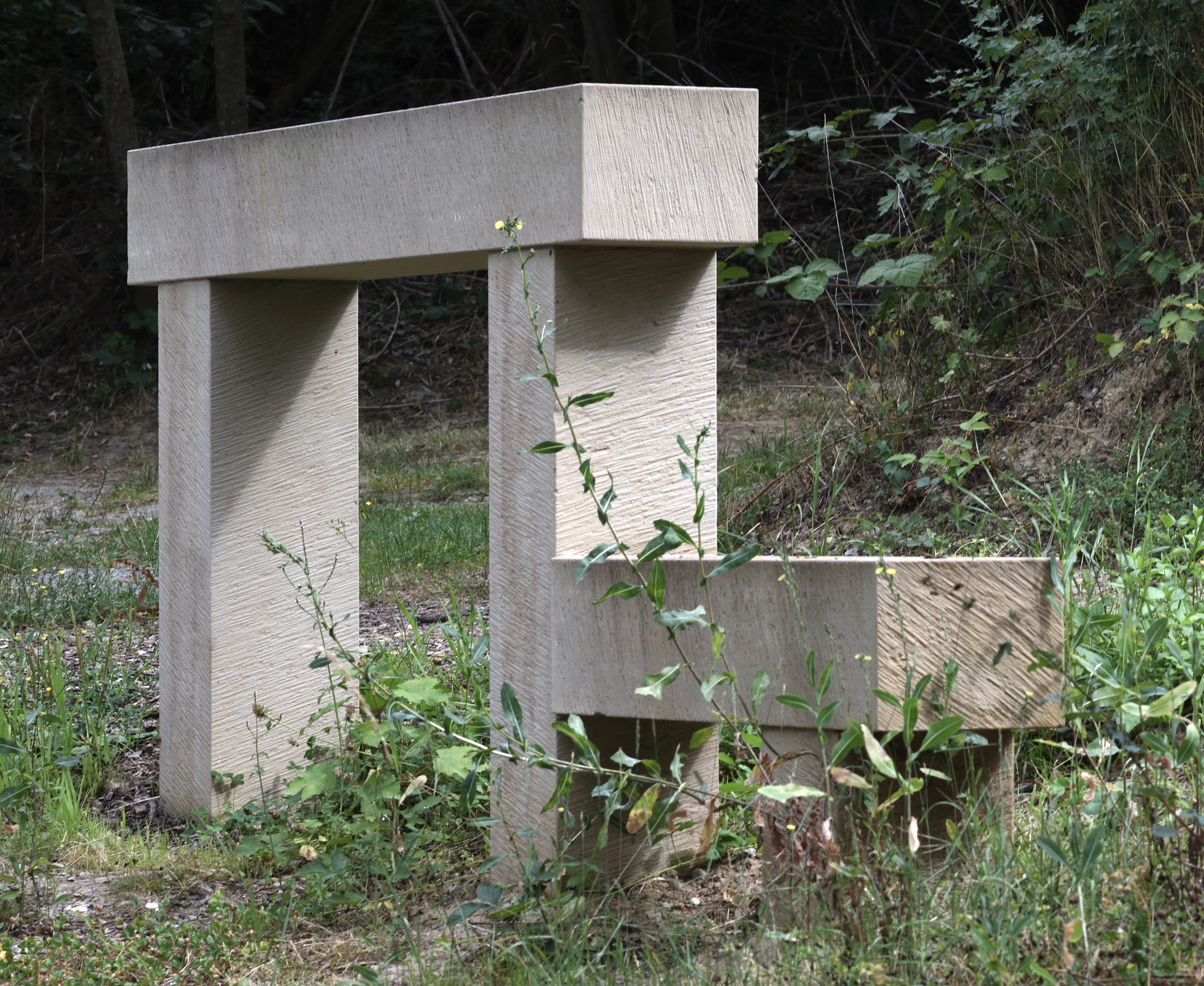 Gruhe bei Neckarrems in der Nähe des alten Steinbruchs